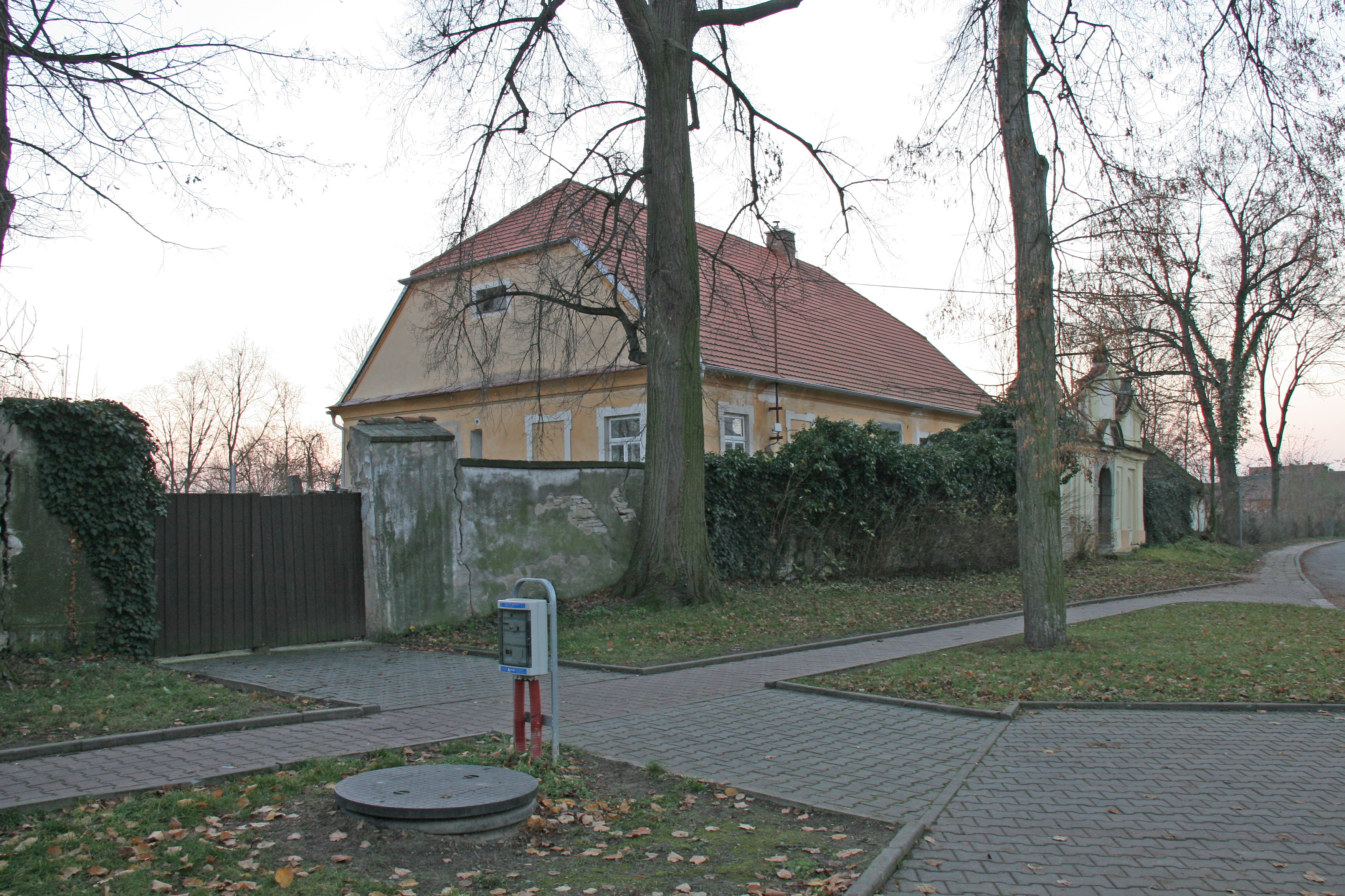 Fara (Horní Roveň), Horní Roveň 74